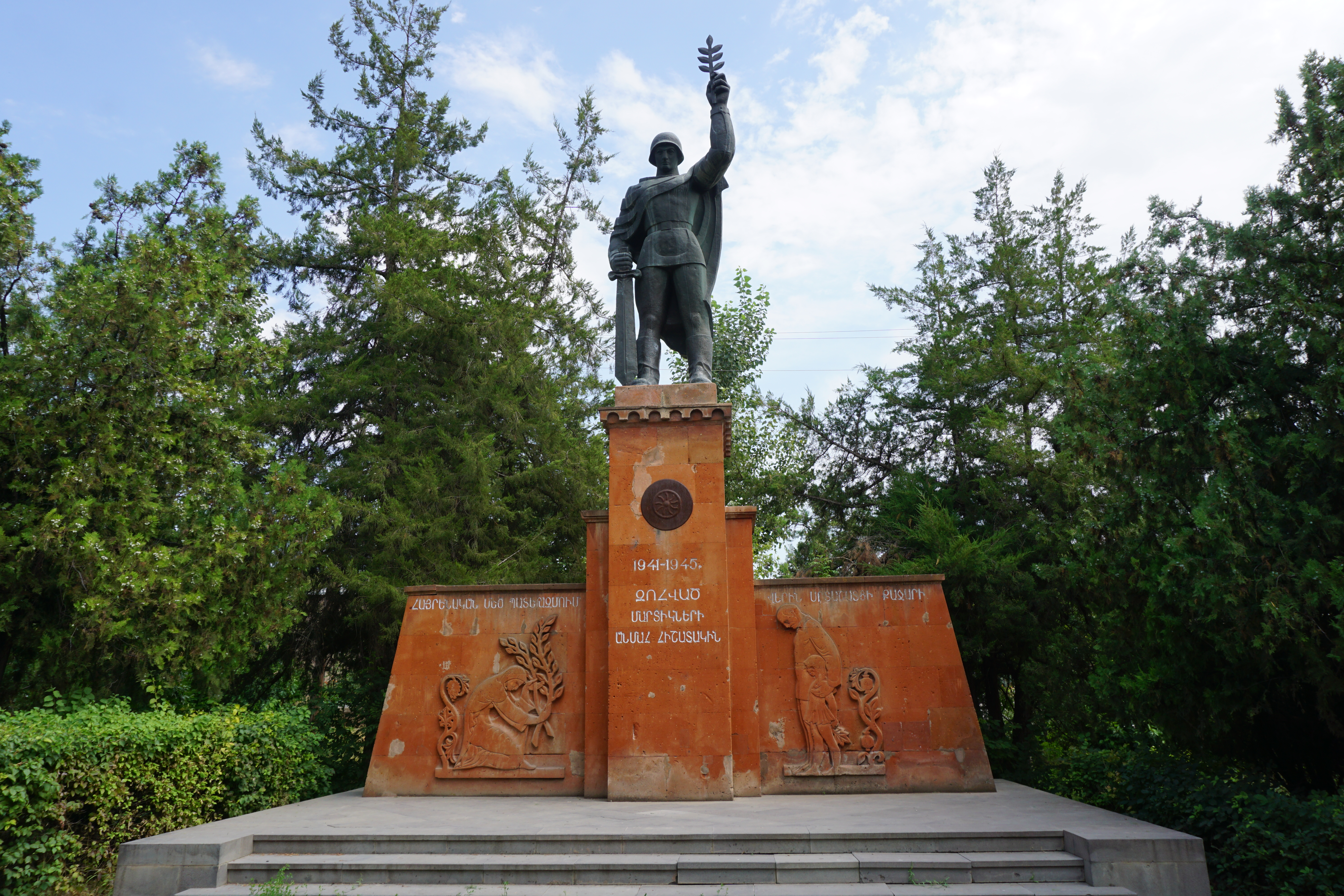 Հուշարձան Երկրորդ աշխարհամարտում զոհվածներին, Վերին Արտաշատ 91/4